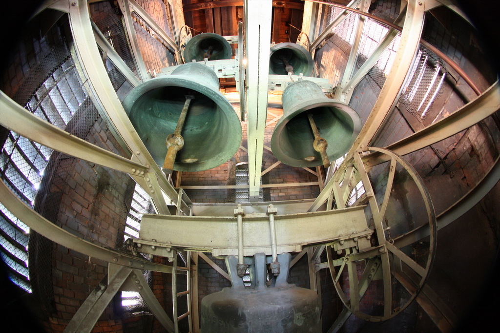 Geläut der Martinskirche (Hamburg-Horn)